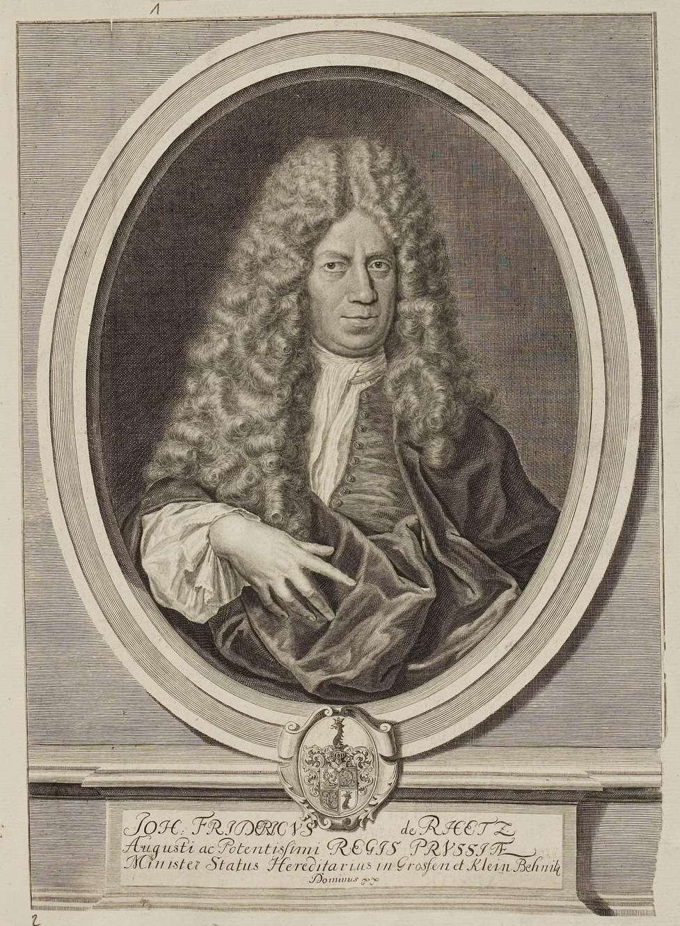 Grafik aus dem Klebeband Nr. 1 der Fürstlich Waldeckschen Hofbibliothek Arolsen Motiv: Johann Rhetz, deutscher Jurist